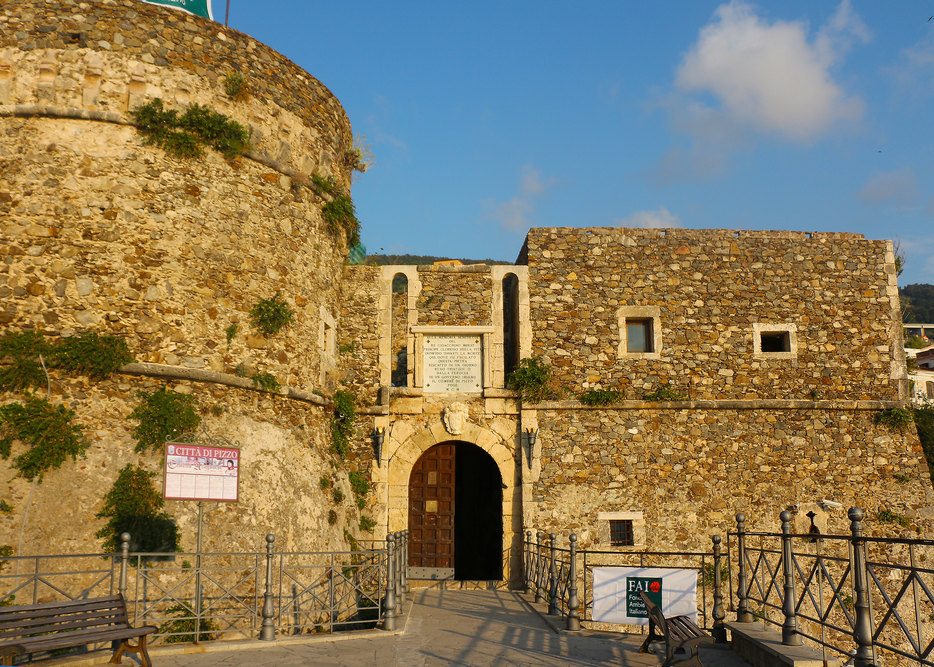 Castello Murat This is a photo of a monument which is part of cultural heritage of Italy.